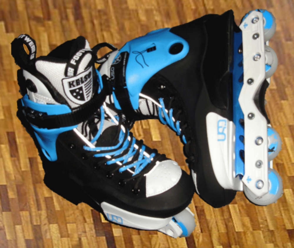 USD Classic Throne Sean Aggressive-Skates